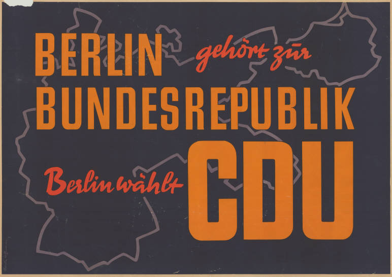 Berlin gehört zur Bundesrepublilk Berlin wählt CDU Abbildung: Umrisse Deutschlands vor dem Krieg Plakatart: Motiv-/Textplakat Künstler_Grafiker: Ursula Hoffmann Objekt-Signatur: 10-004 : 100 Bestand: Plakate zu Abgeordnetenhauswahlen Berlin (10-004) GliederungBestand10-18: Plakate zu Abgeordnetenhauswahlen Berlin (10-004) » CDU Lizenz: KAS/ACDP 10-004 : 100 CC-BY-SA 3.0 DE